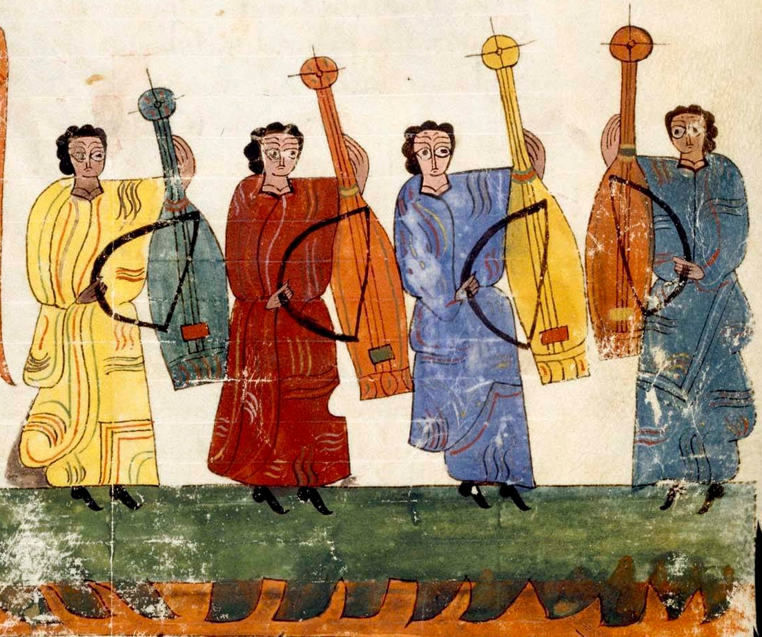 Folio 130r miniado del Beati in Apocalipsin libri duodecim. Vitr-14/1. Escritura visigótica. 144 folios en pergamino a 2 columnas, de 33 a 35 líneas por página. Miniatura mozárabe. Procedente de la biblioteca de Serafín Estébanez Calderón y de San Millán de la Cogolla. In English the page describing the work is Commentary on the Apocalypse